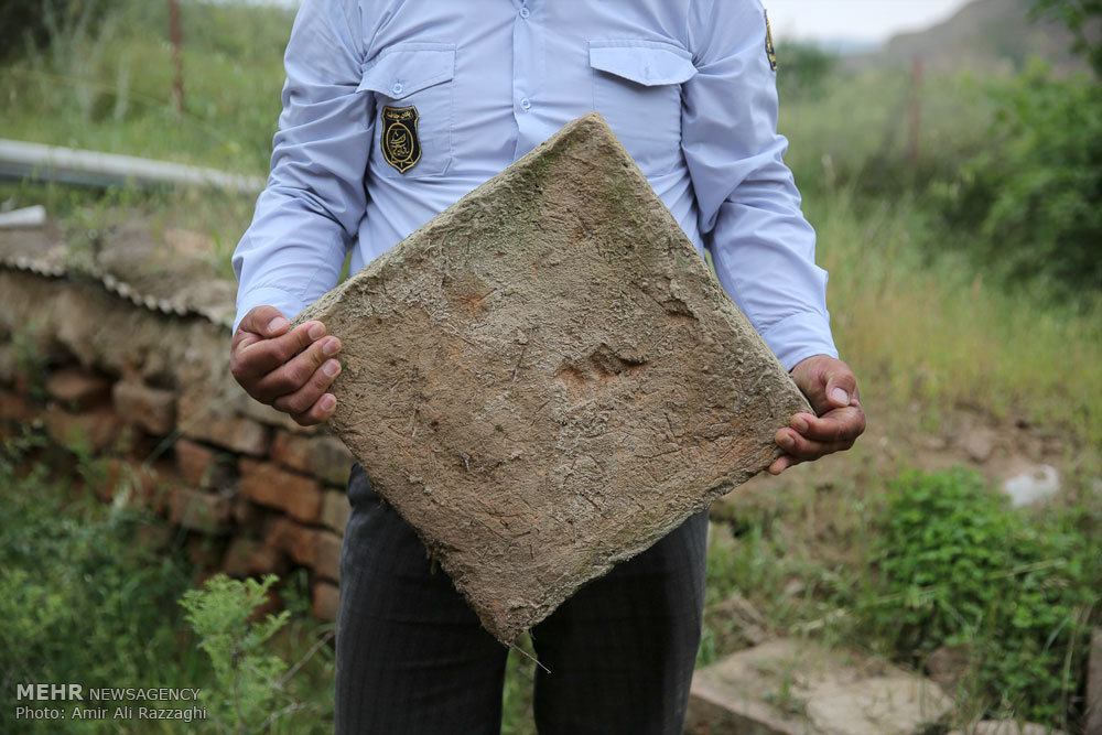 دیوار بزرگ اسکندر یا دیوار سرخ که در متون قدیمی با نام مار سرخ نیز نامیده‌شده‌است ، دیواری تاریخی است که از کنار دریای خزر در ناحیه گمیشان آغاز شده و تا کوه‌های گلیداغ در شمال شرق کلاله ادامه می‌یافته‌است. هم‌اکنون تقریباً تمام این دیوار از میان رفته‌است و تنها بخش‌های کوچکی از آن که در زیر خاک مدفون مانده، باقی است. دیوار تاریخی گرگان پس از دیوار چین (به طول شش هزار کیلومتر) ، بزرگترین دیوار دفاعی جهان است. این دیوار عظیم تاریخی که ۲۰۰ کیلومتر طول دارد در ۲۹ تیرماه سال ۱۳۷۸ به ثبت ملی رسیده‌است.